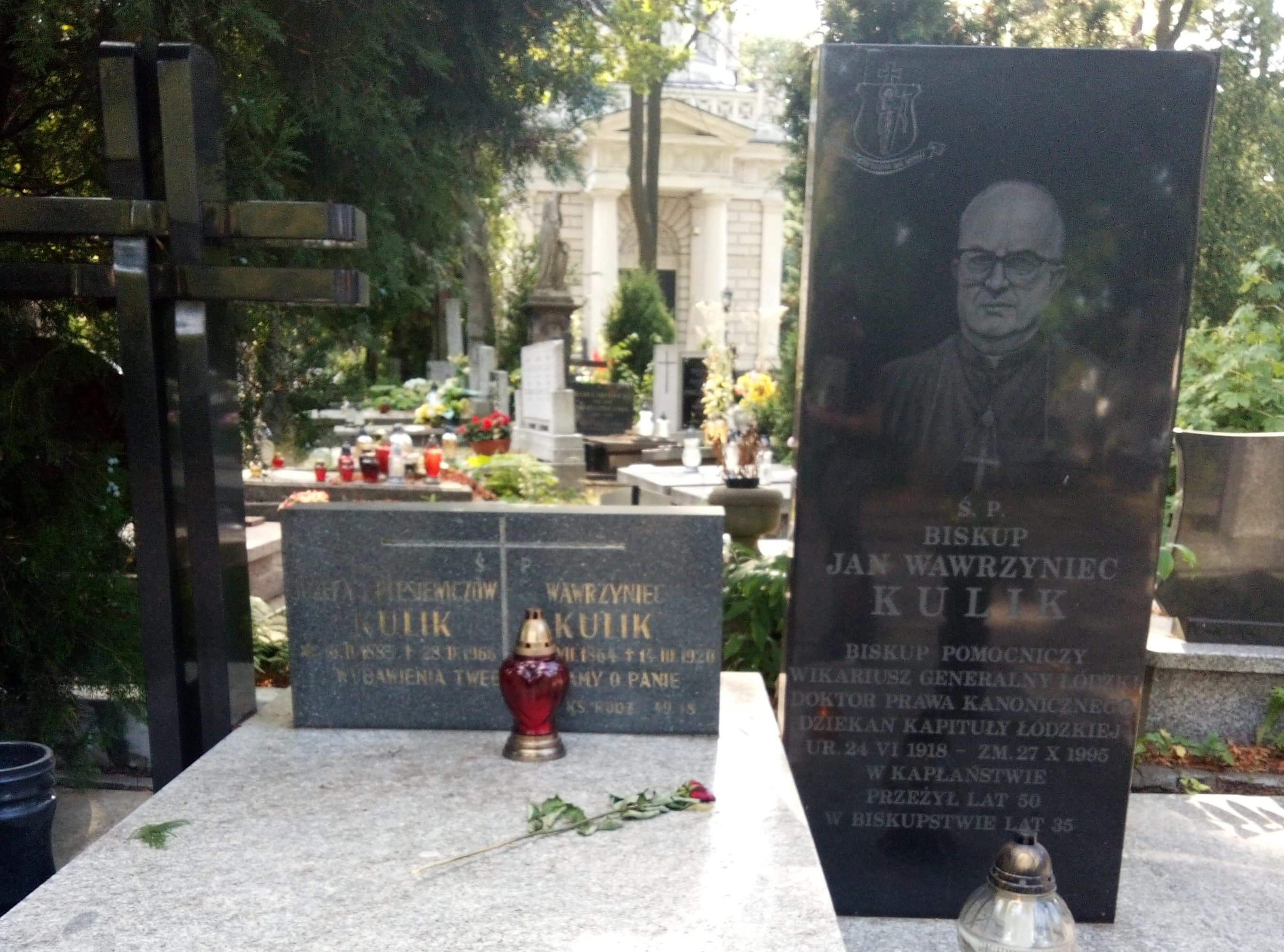 Grobowiec rodzinny w którym spoczywa Bp Jan Kulik